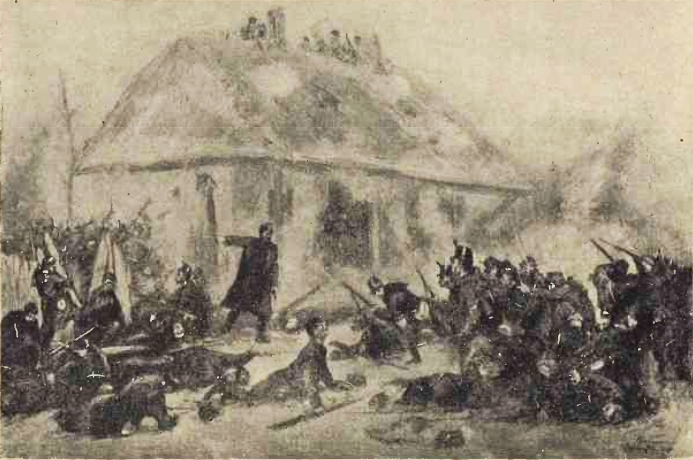 Oscar Obedeanu (n. 14 aprilie 1868, Bucureşti - d. 11 ianuarie 1915, Bucureşti) - Lupta de la Smardan